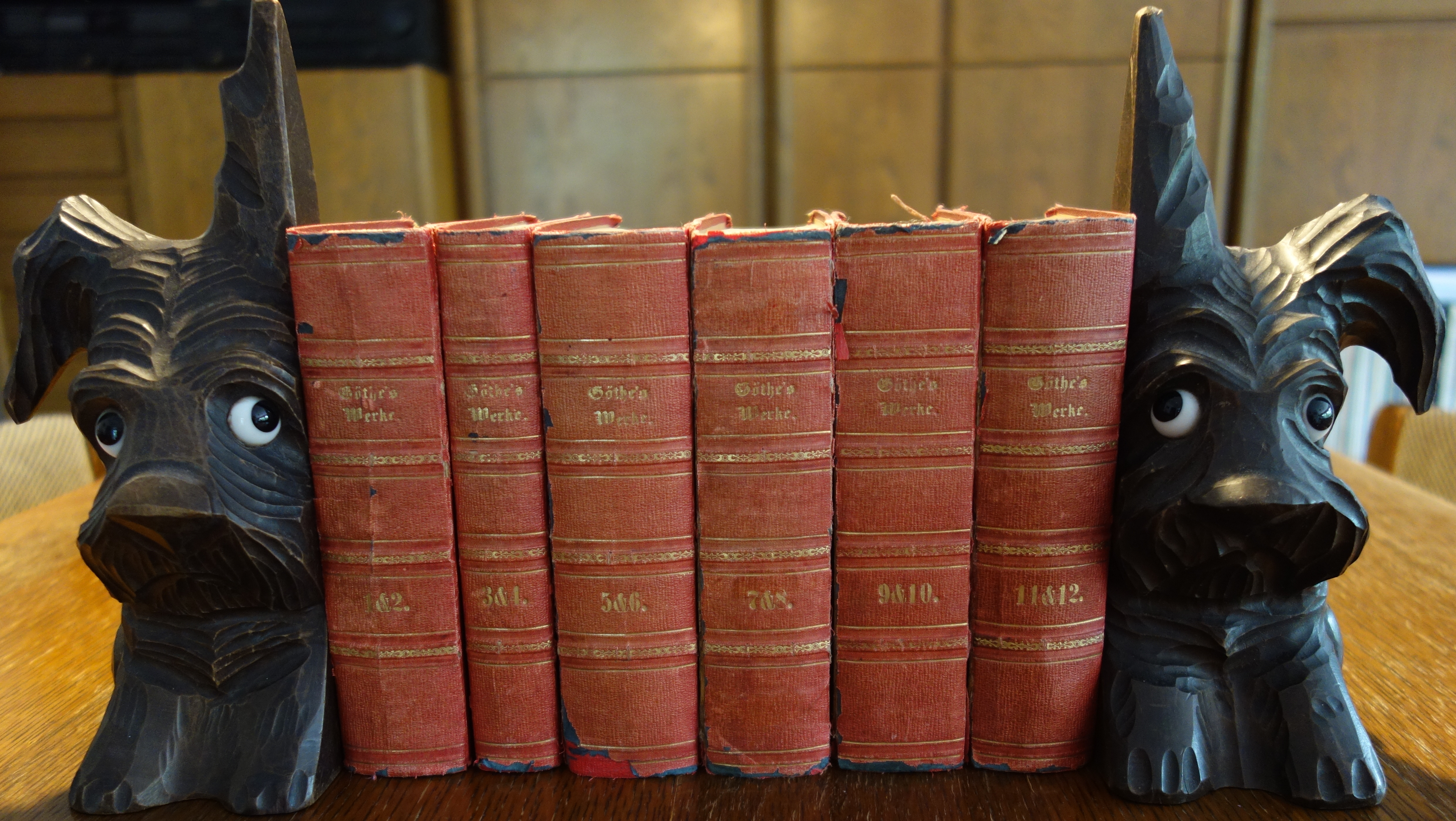 Buchstützen mit Hundemotiv